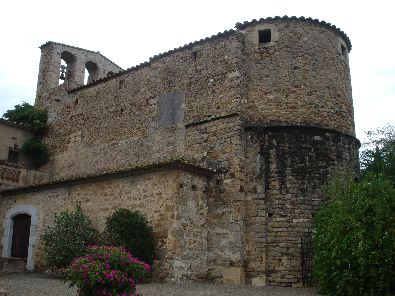 Eglesia de Sant Martí de Fontanilles (Girona, Catalunya, Espanya) - Vista del absis